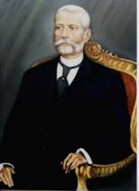 tela com pessoa sentada e trajando terno